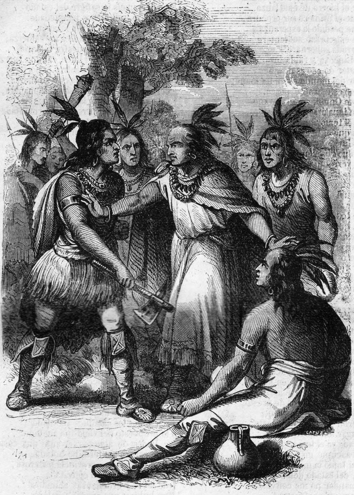 Discordia entre los caciques de Arauco en la que medió ColoColo